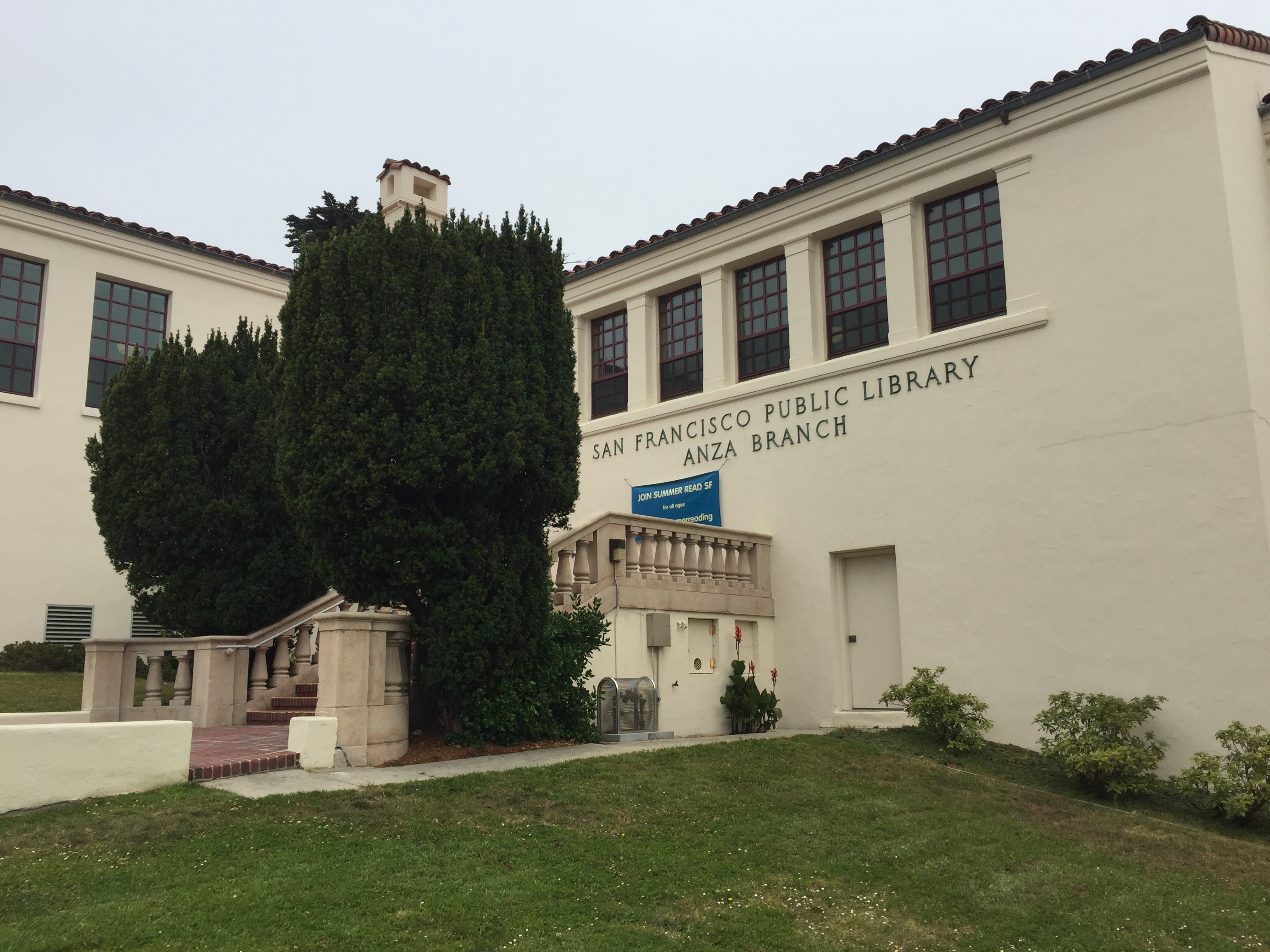 Anza Branch